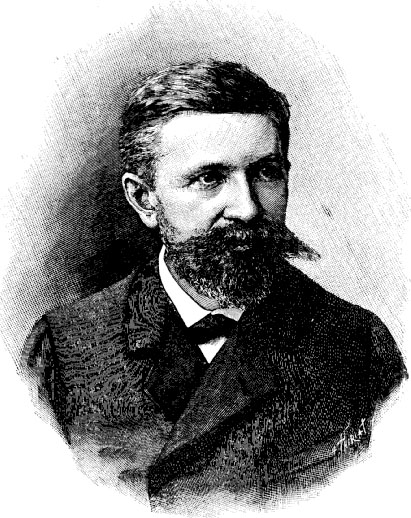 Portrait de Charles Grad (L'Alsace, le pays et ses habitants, Hachette, 1906 (rééd.), NP)